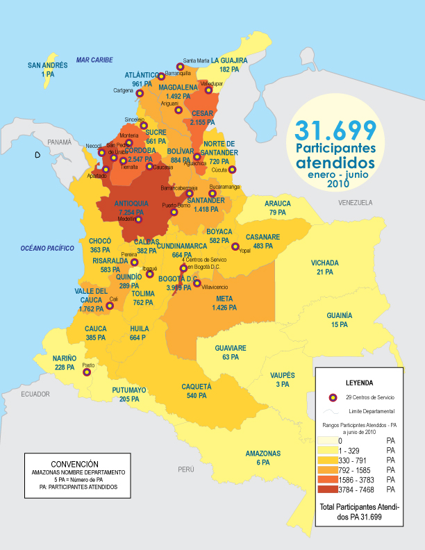 Mapa de los desmovilizados en proceso de reintegración atentidos por la ACR en Colombia